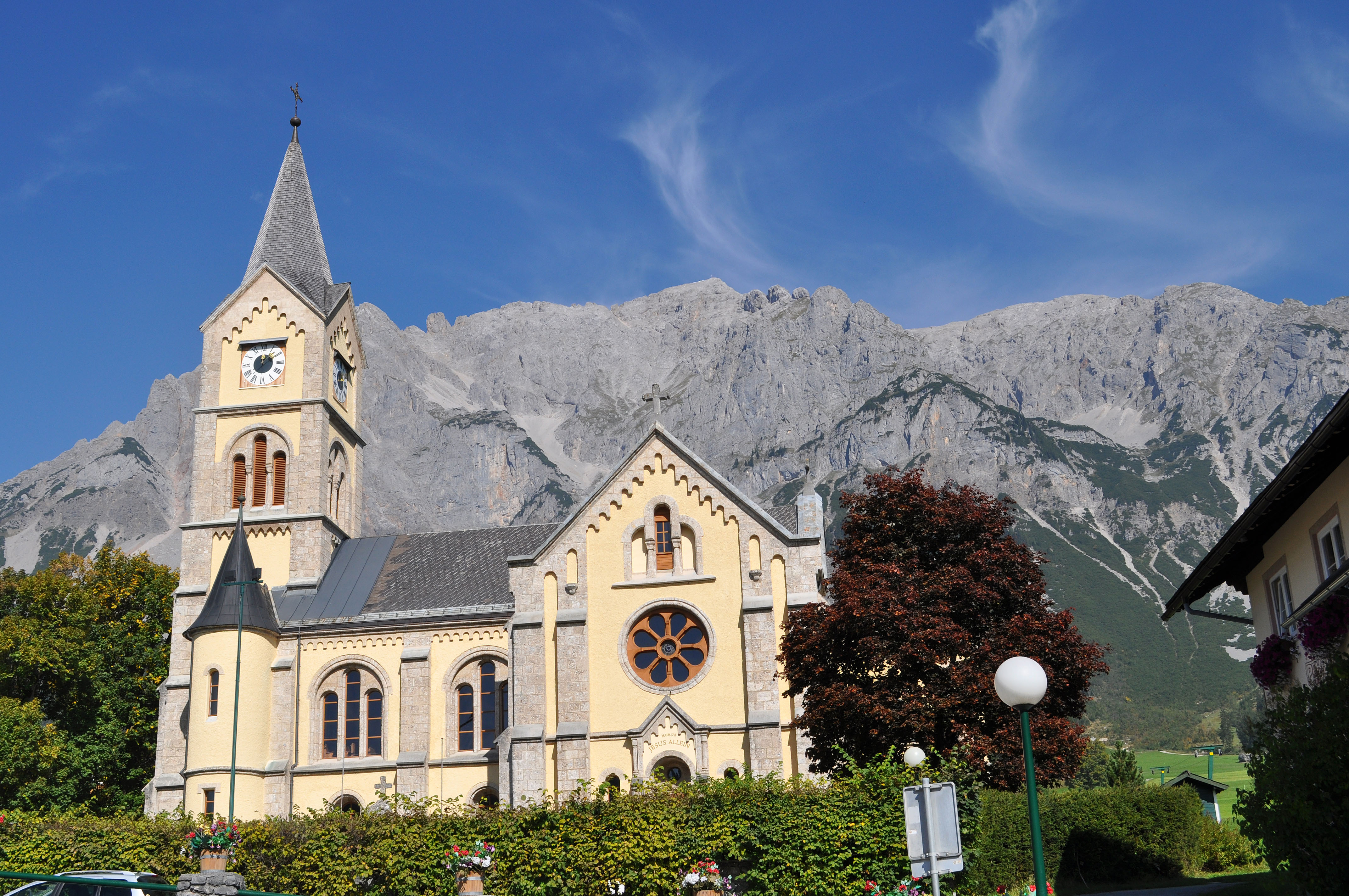 Evang. Pfarrkirche A.B., Ramsau am Dachstein